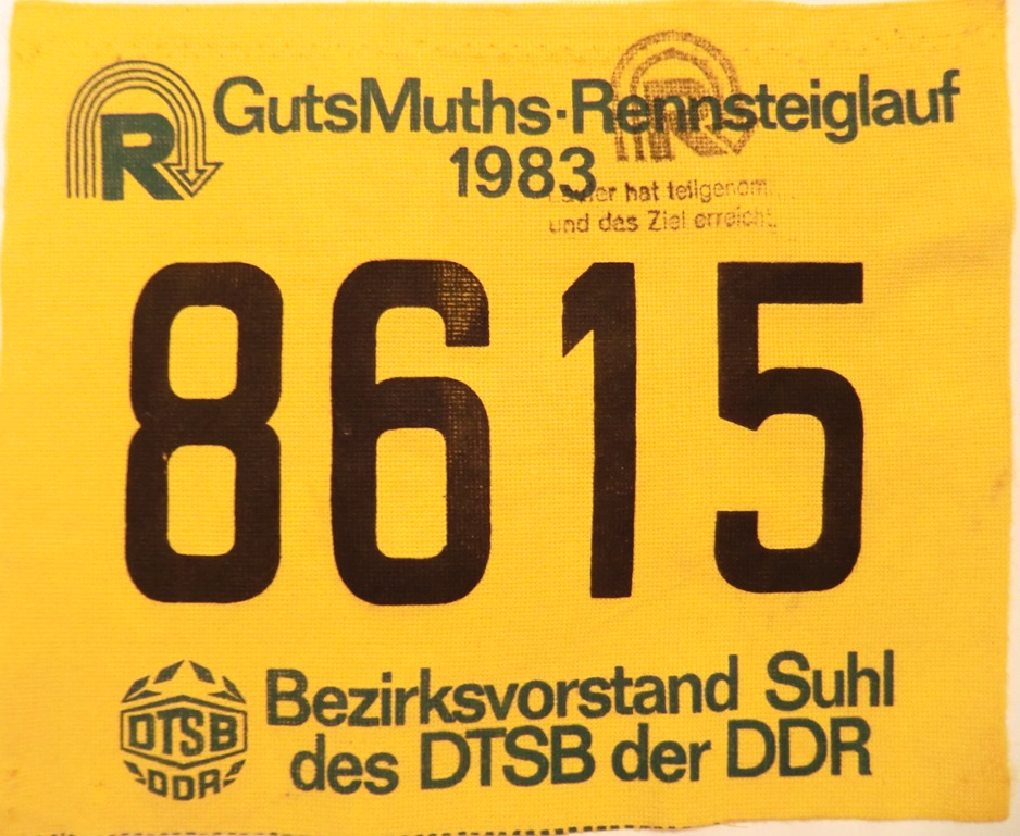 Eigene Startnummer für den GutsMuths-Rennsteiglauf 1983, selbst aufgenommen